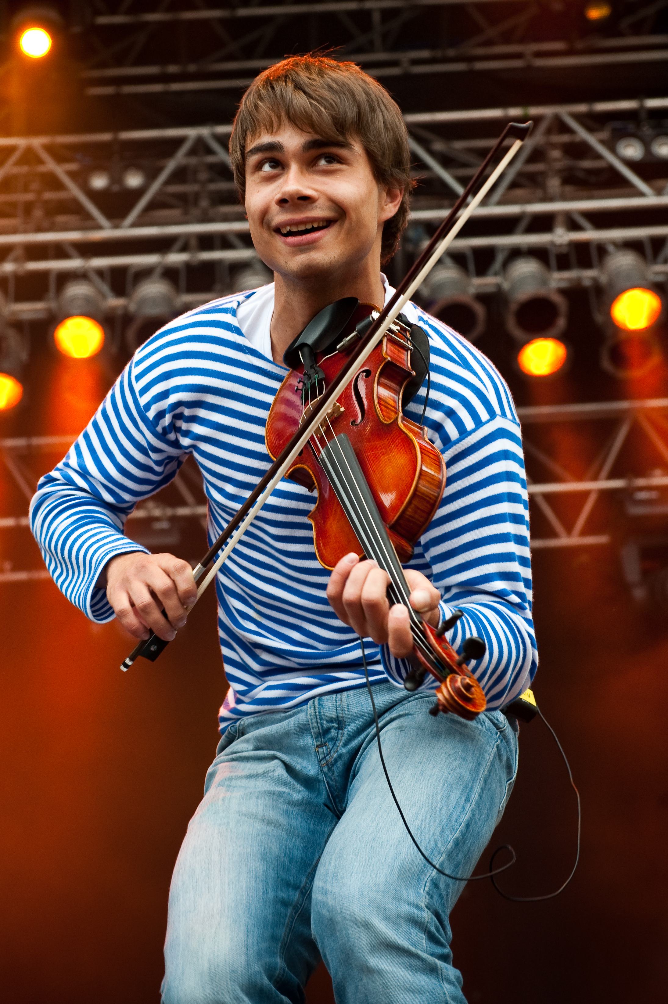 Alexander Rybak